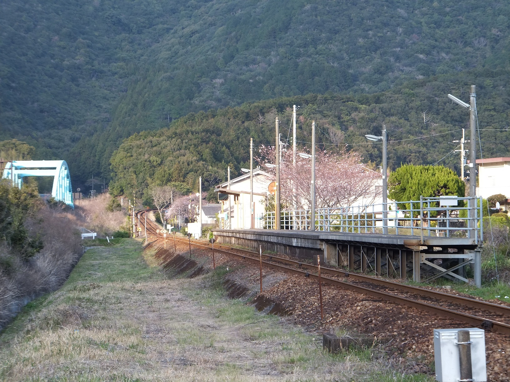 JR牟岐線 北河内駅 （徳島県海部郡美波町）写真左は日和佐道路のうみがめ橋